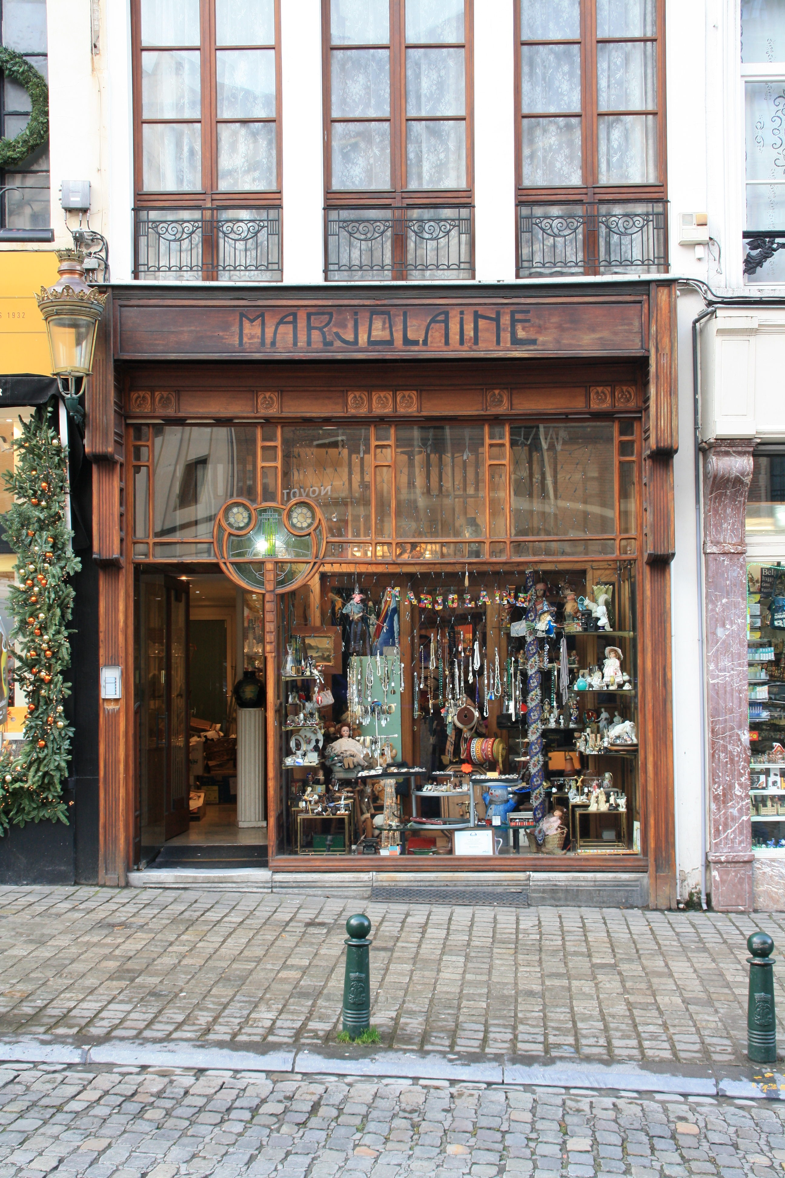 Façade du magasin "La Marjolaine" situé au 7, Rue de la Madeleine, à deux pas de la Grand-Place de Bruxelles. Le bâtiment est aujourd'hui répertorié en tant que patrimoine.